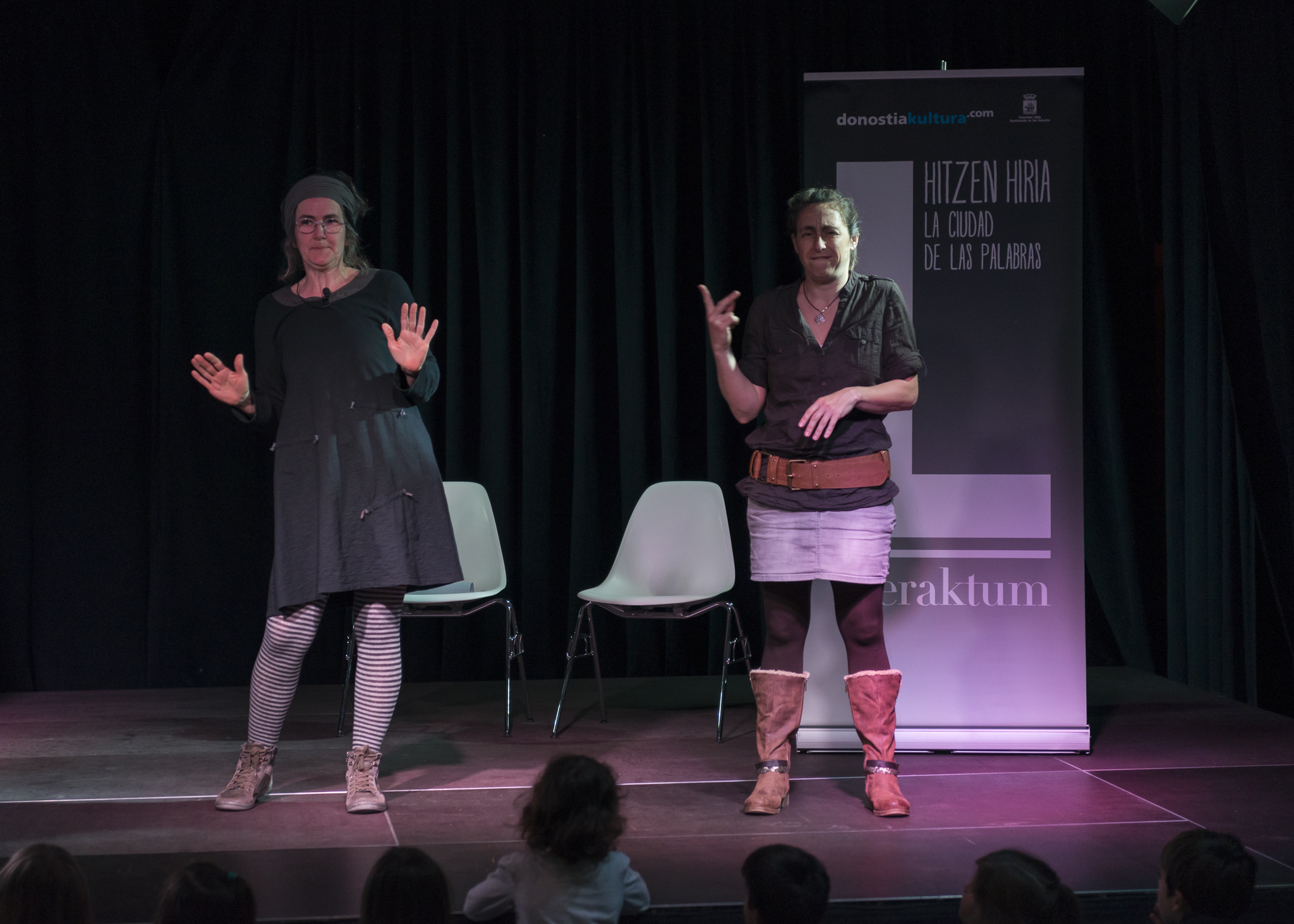 Ixabel Agirresarobe kontalaria Literaktum jardunaldietako saioan, zeinu hizkuntzako interpretearekin.